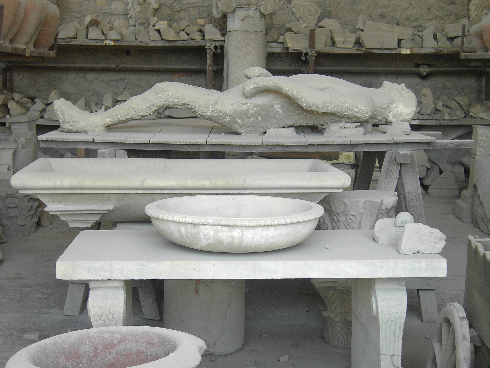 Ausgüsse von Hohlräumen aufgelöster organischer Artefakte